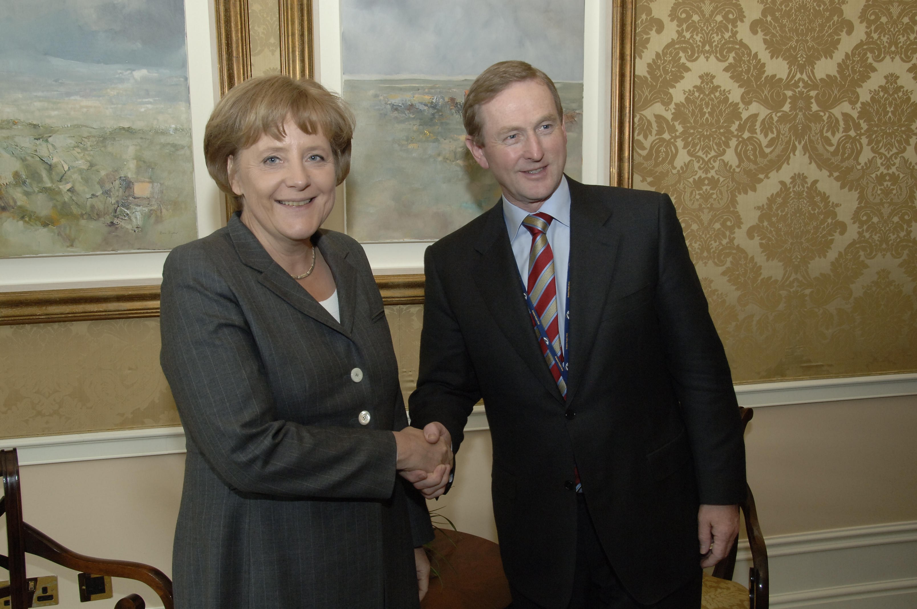 EPP LEADERS MEET IN DUBLIN 14 April 2008